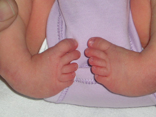 pied bot varus equin bilateral